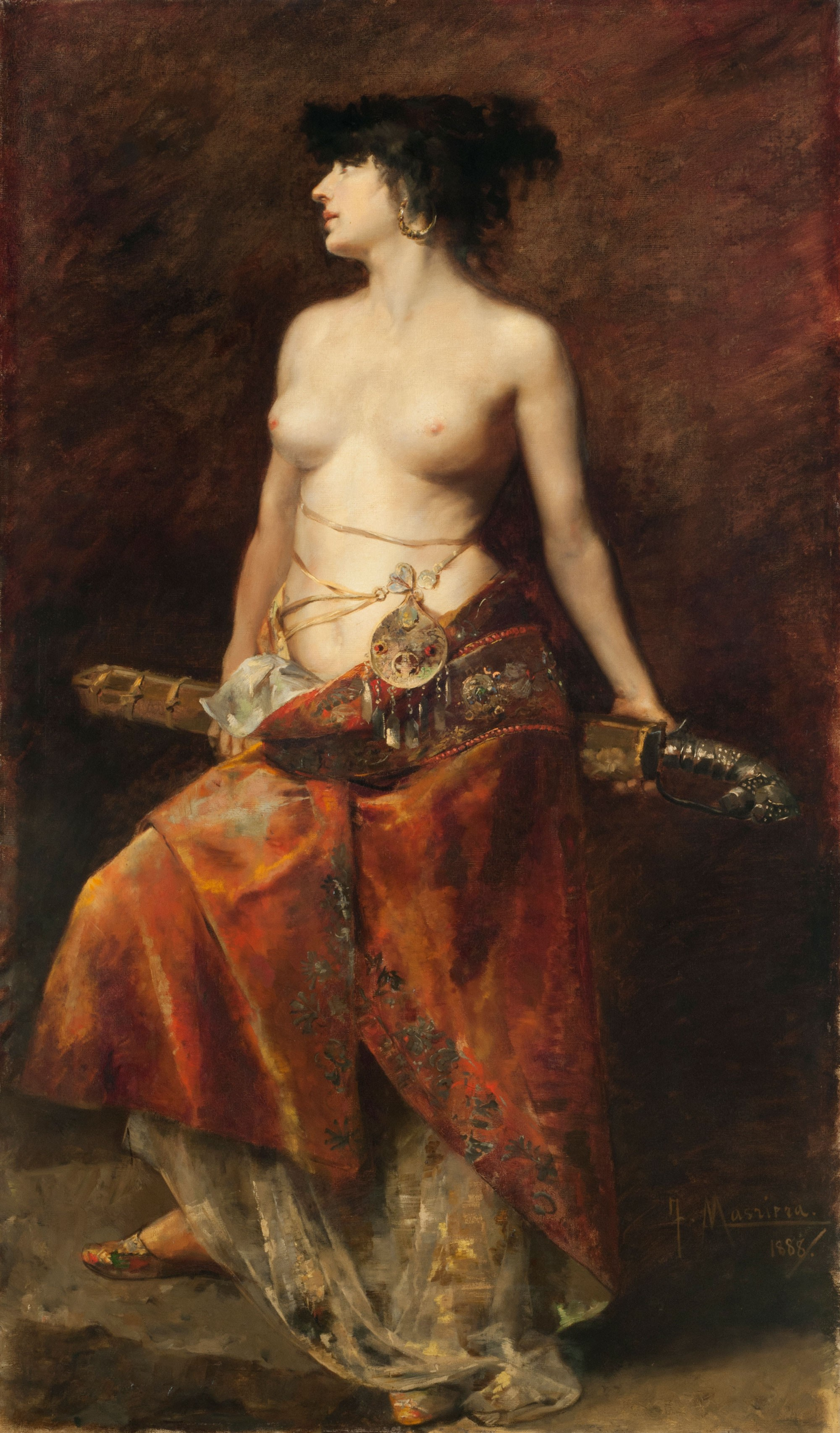 Francisco Masriera, Salomé (Tít. ant.: La vencida). 1888. 176 x 105 cm, con marco: 231 x 157,5 cm, óleo sobre tela. Inv. 6132.